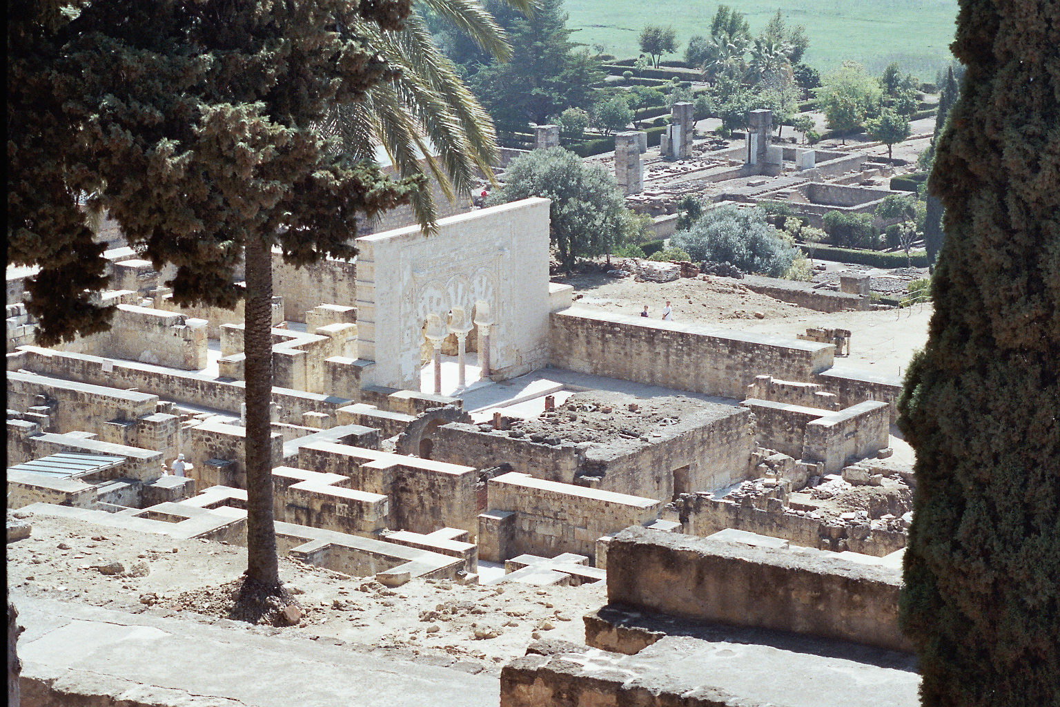 Medina-Al-Zahra en Andalousie (Espagne)